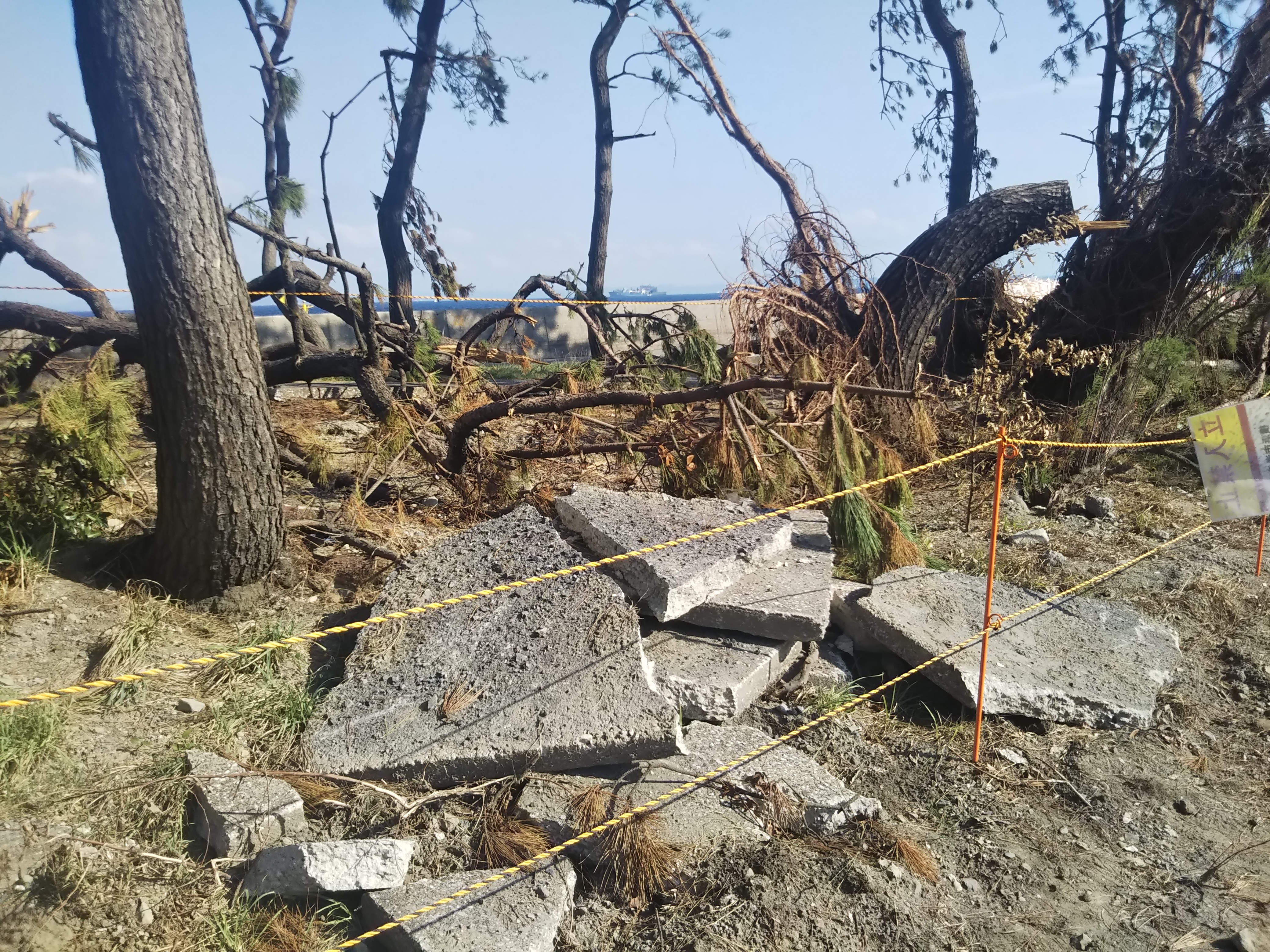 令和元年台風第15号で損壊した、横浜市金沢区の防波堤